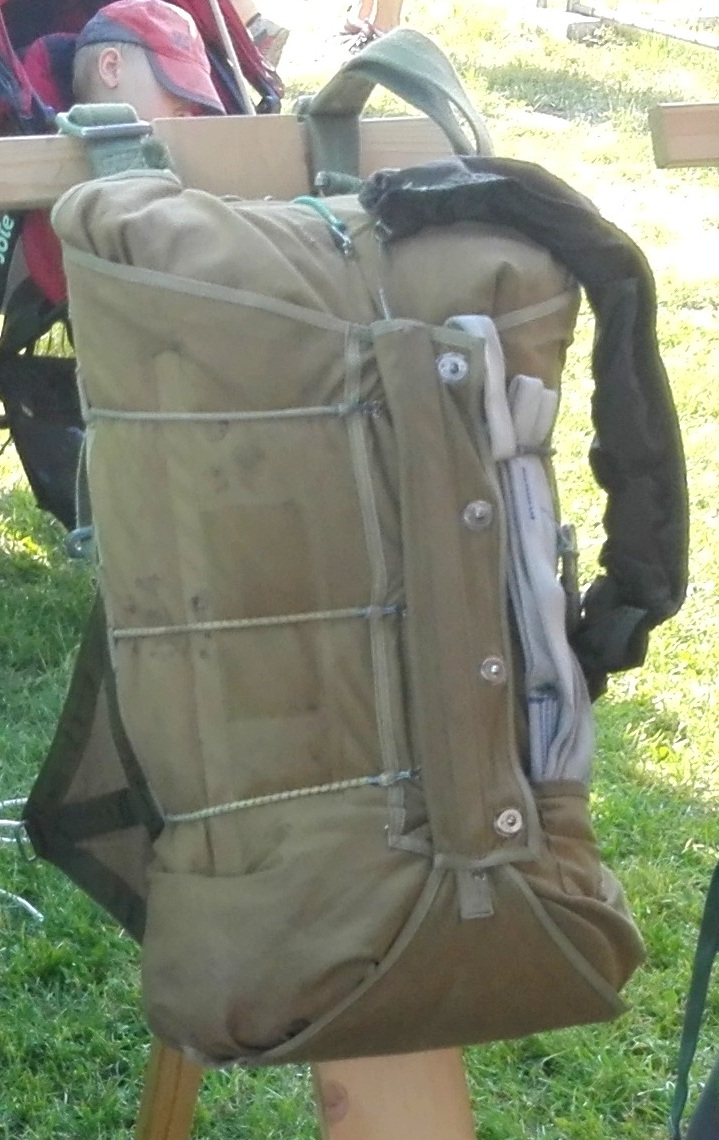 Spadochron PD-47 wystawiony przez Muzeum Spadochroniarstwa i Wojsk Specjalnych, podczas Pikniku Lotniczego „Śląskie Służby Mundurowe Dzieciom”